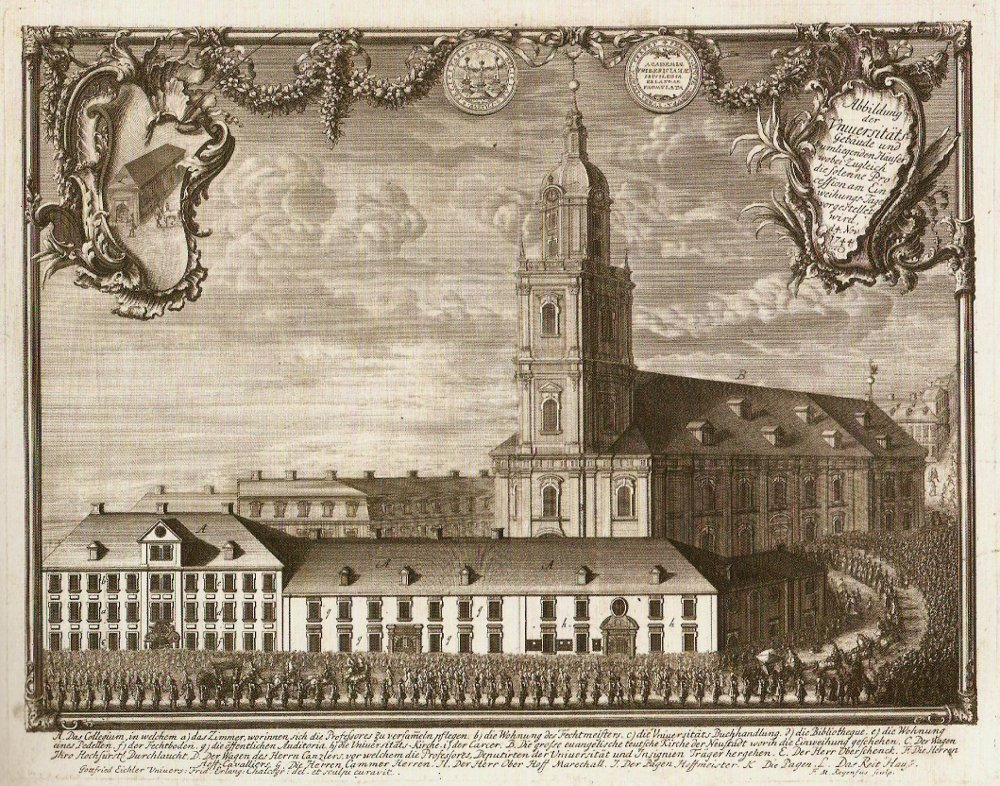 Festzug bei der Einweihung der Universität Erlangen. Idealisierte Ansicht von der Ecke Hauptstraße / Friedrichstraße mit der Neustädter Kirche